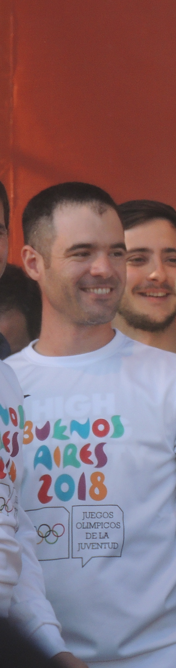 Pandi